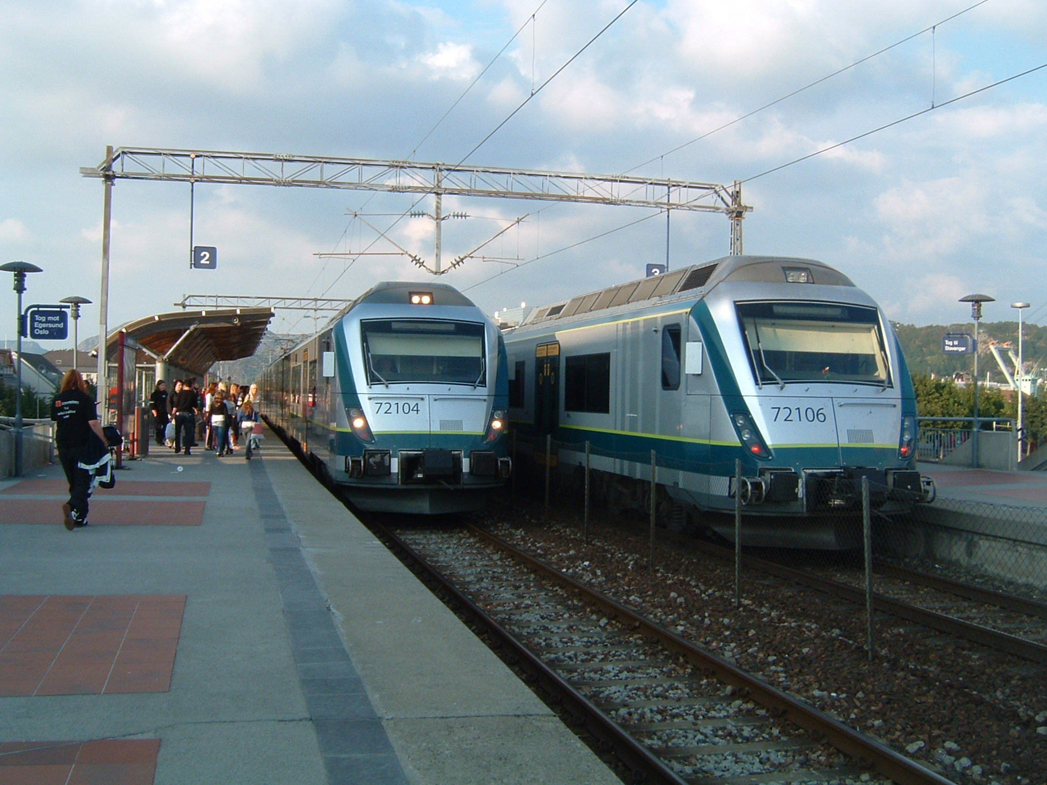 Sandnes sentrum stasjon med to lokaltog type 72 fra NSB. Toget til venstre kommer fra Stavanger og toget til høyre kommer fra Egersund.